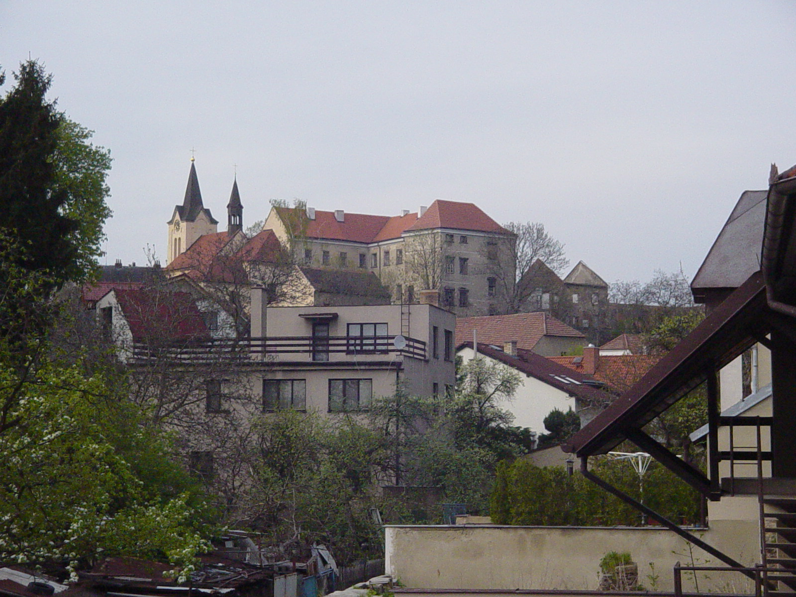 Chvalská tvrz focená ze západní strany